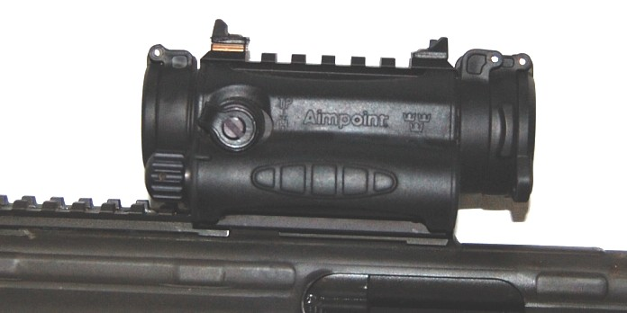 Ak4B med Aimpoint